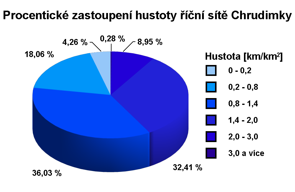 Procentické zastoupení hustoty říční sítě Chrudimky